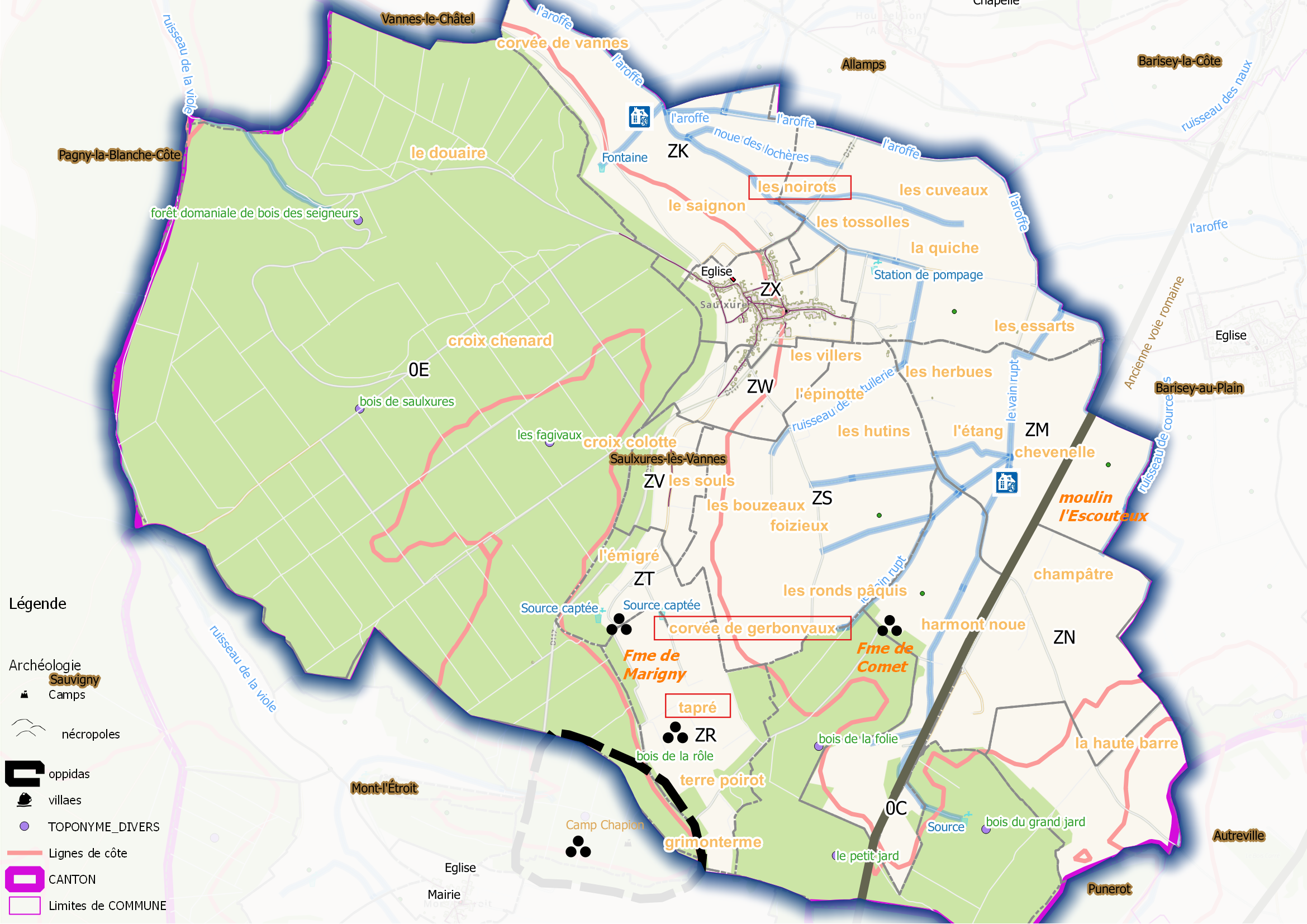 Saulxures (ban communal) Osm et Qgis, mentions additionnelles